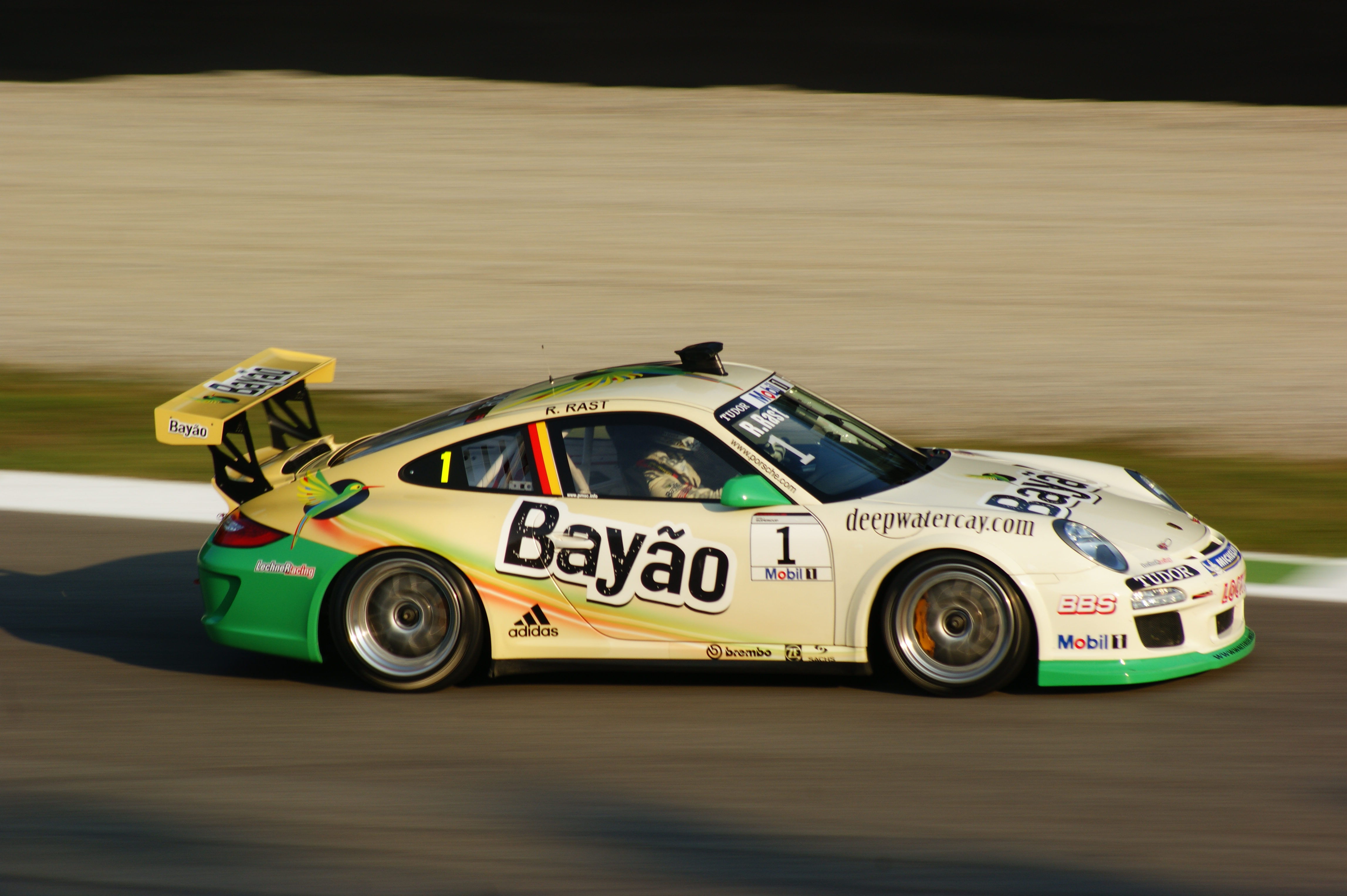 René Rast alla variante Ascari Monza 2011